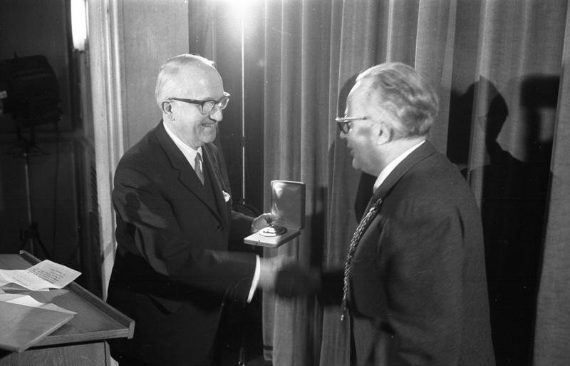 Verleihung des Robert-Schuman-Preises an Prof. Walter Hallstein durch den Rektor der Uni Bonn, Prof. Partsch Information added by Wikimedia users.Hallstein erhielt den nach dem ehemaligen französischen Außenminister benannten Robert-Schuman-Preis